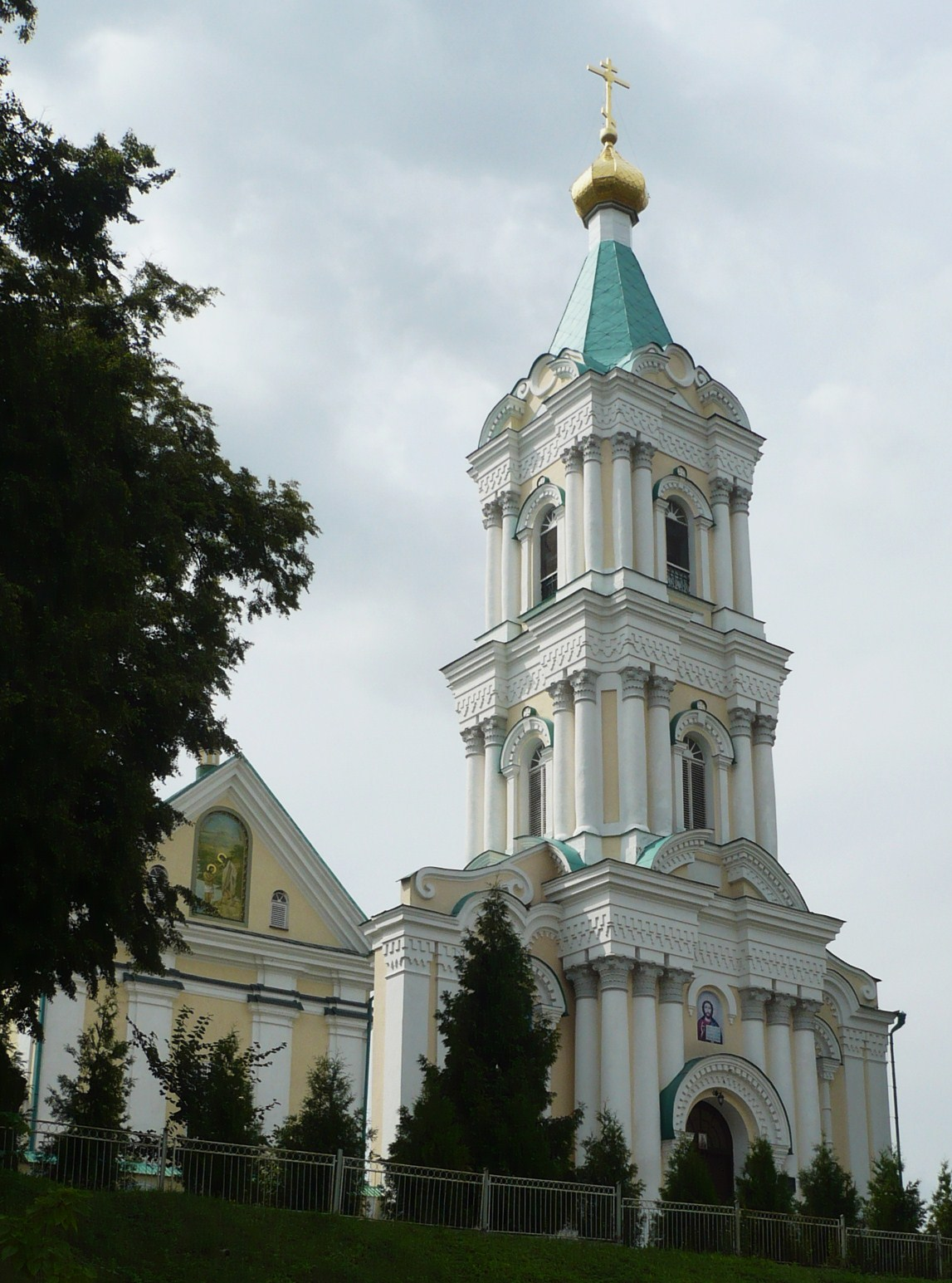 Monaster Objawienia Pańskiego w Krzemieńcu